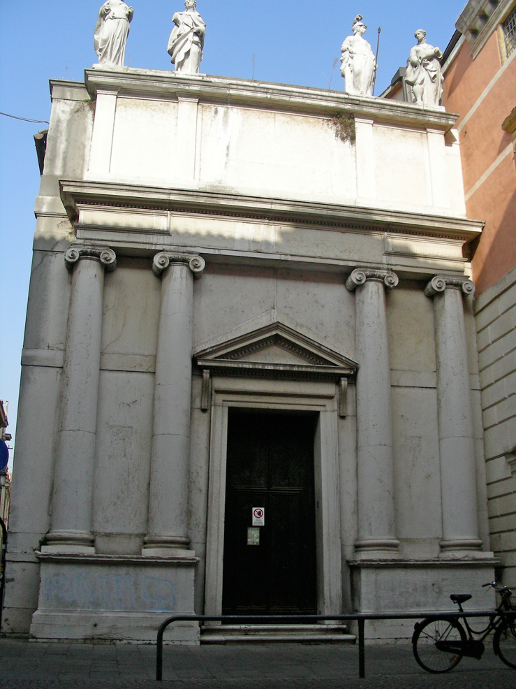 Padova, oratorio di Santa Margherita di Antiochia di Pisidia (1748 Tommaso Temanza)